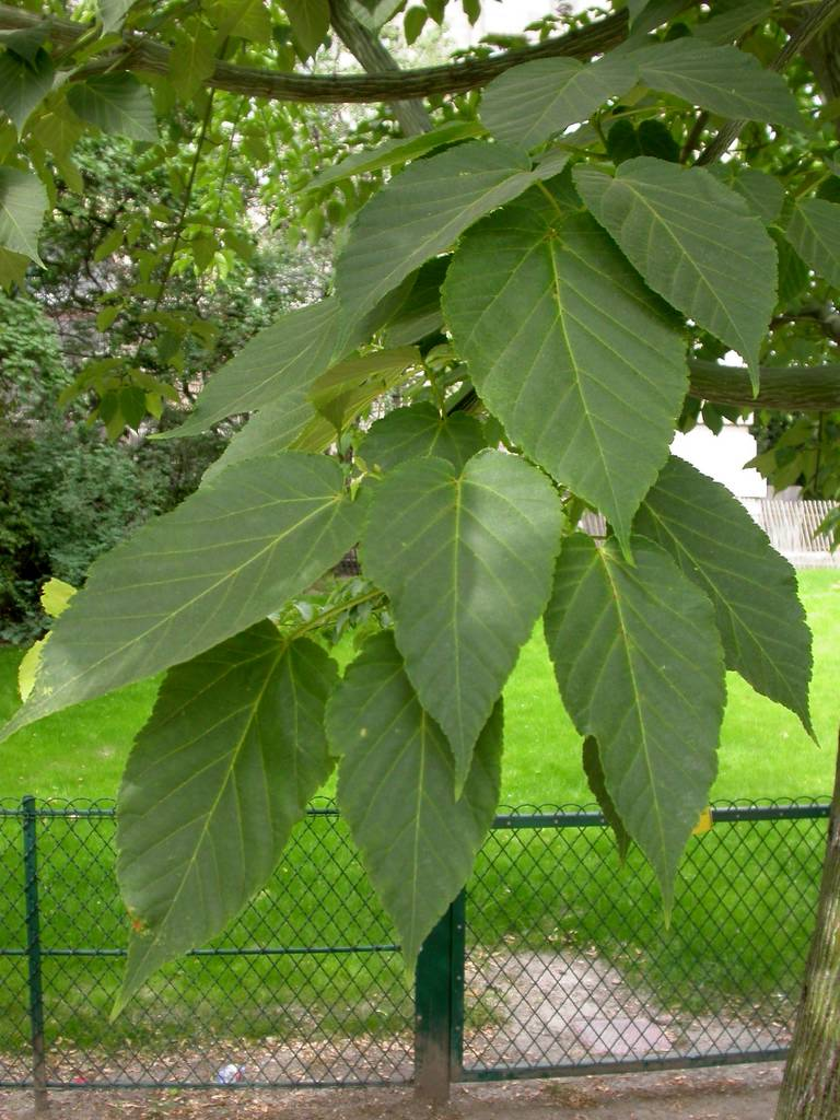 Feuilles d'Acer davidii.